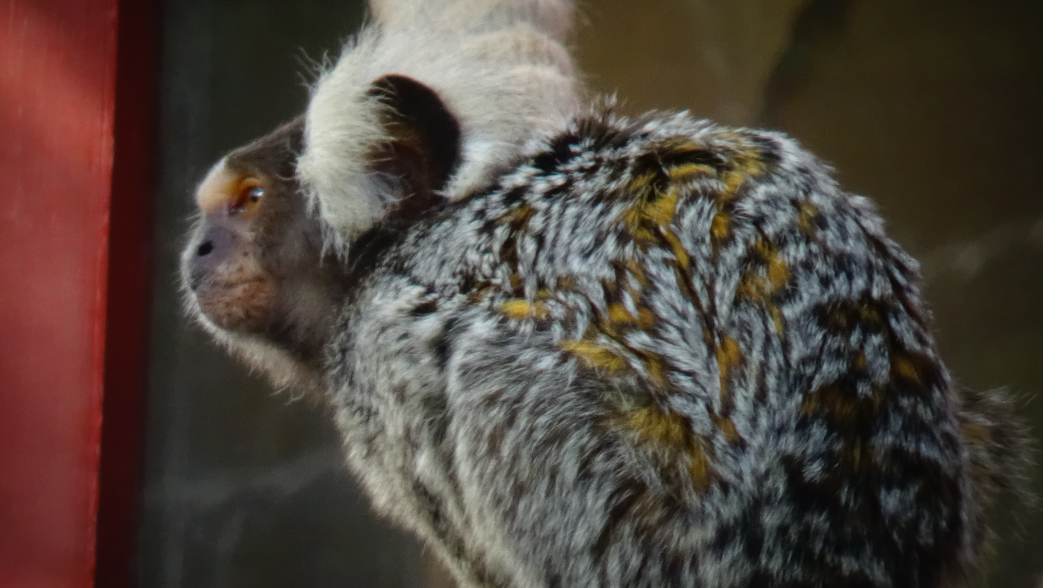 Callithrix jacchus - oustiti a toupets blanc - mâle adulte - Ménagerie du jardin des plantes de Paris, iles de France, France - 11/2014